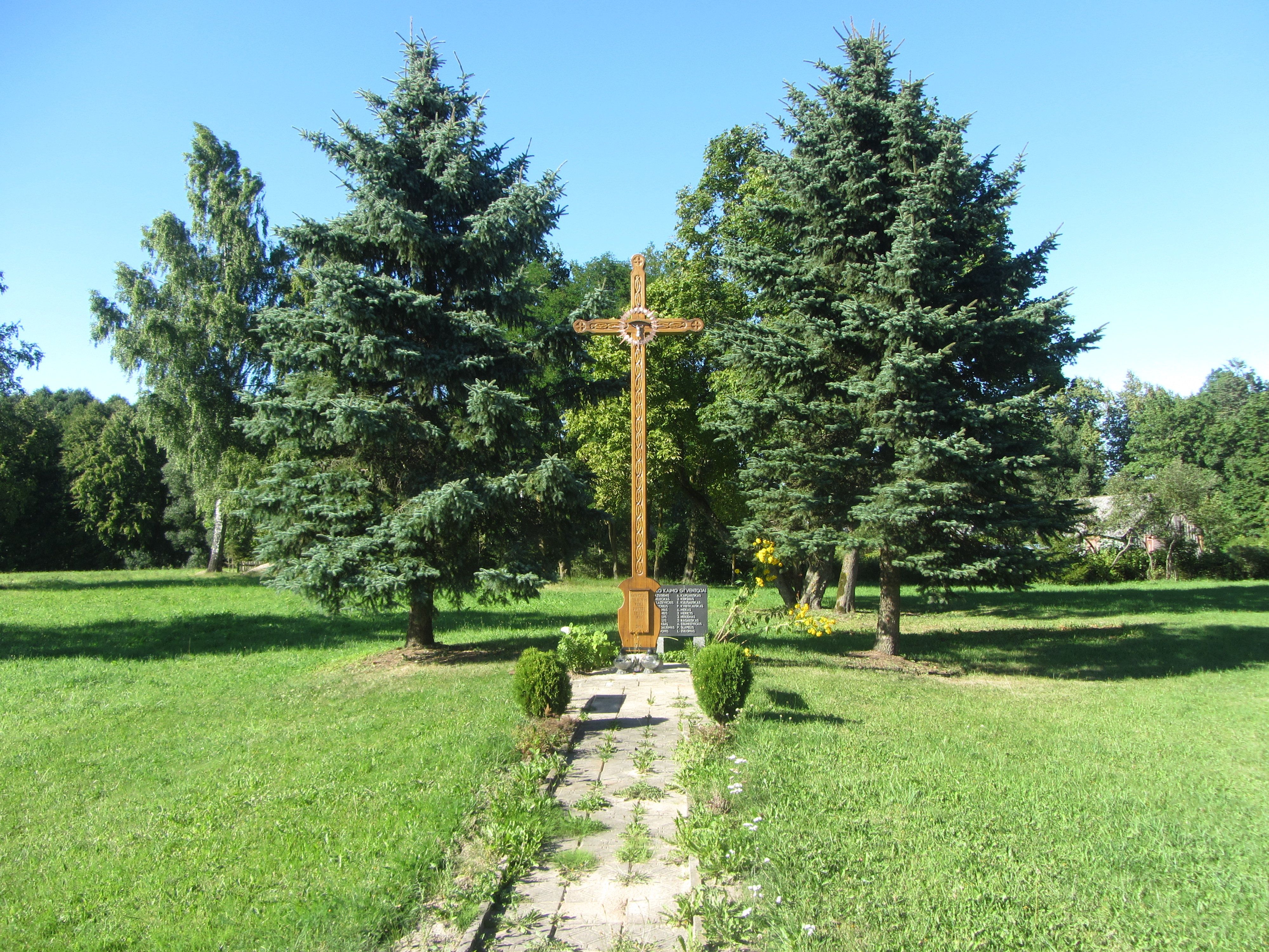 Šimonių sen., Lithuania